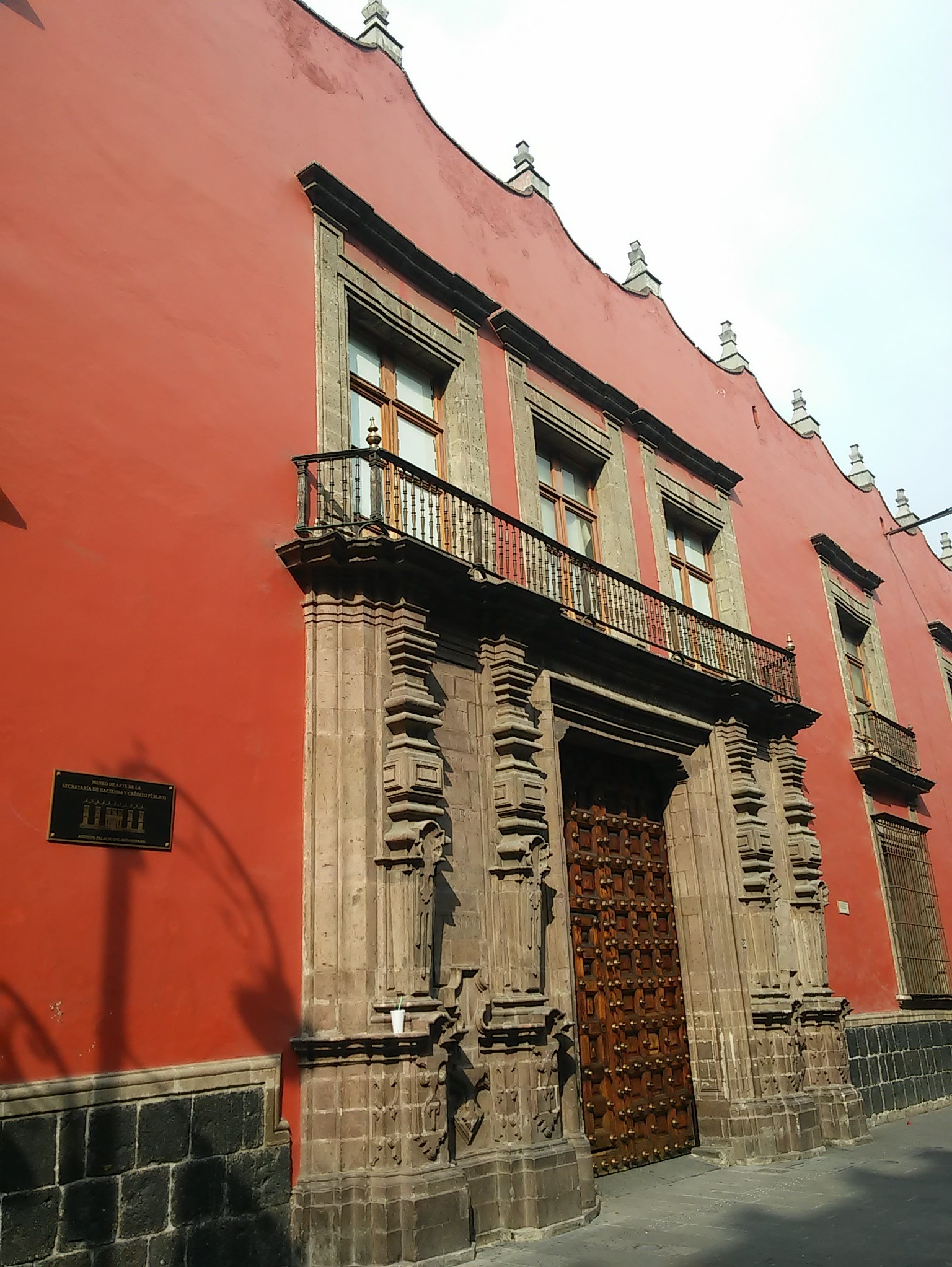 Antiguo palacio del arzobispado en el centro histórico de la ciudad de México